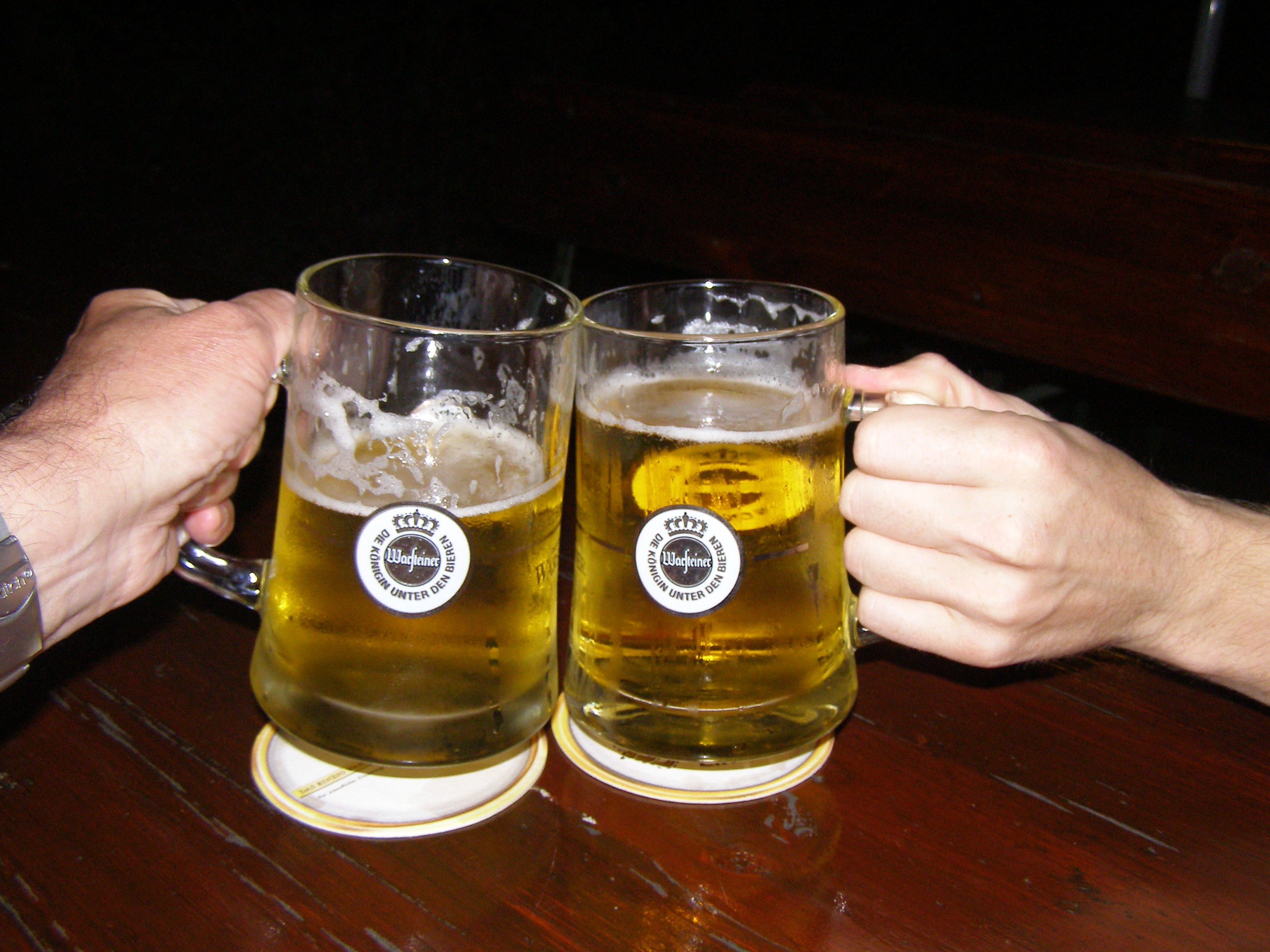 wikisourcní setkání v Berlíně 16.08.2007 (Chmee(0-9) a -jkb-) (ruka vlevo: -jkb-, ruka vpravo: Chmee2